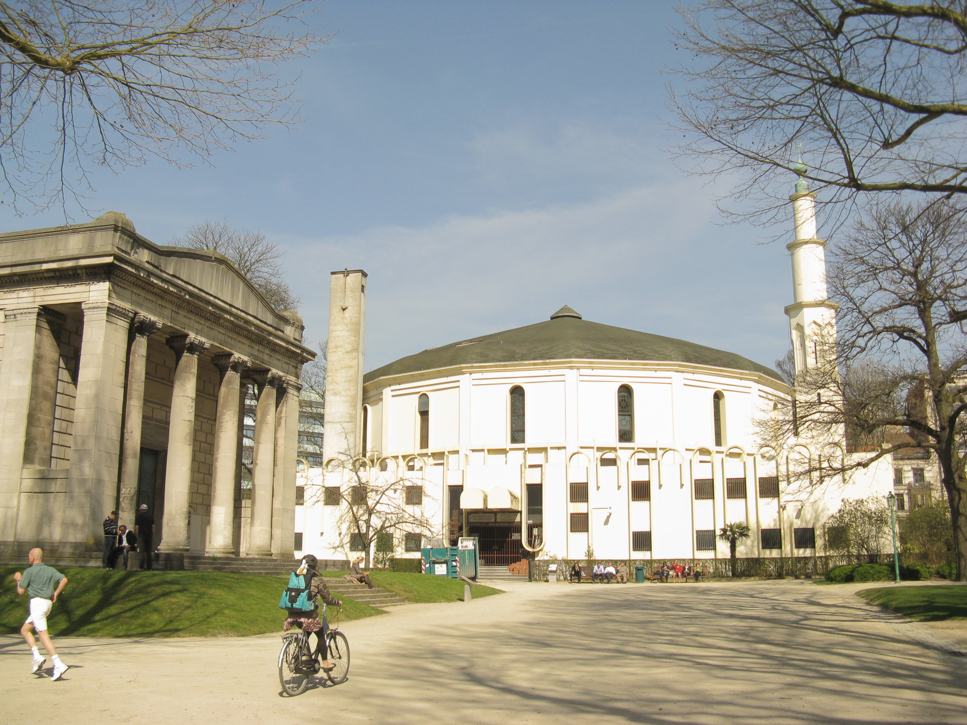 Jubelpark, Brussel. Links: het Paviljoen der Menselijke Driften. Rechts het gebouw voor het Panorama van Caïro, thans de Grote Moskee van Brussel en Islamitisch en Cultureel Centrum van België